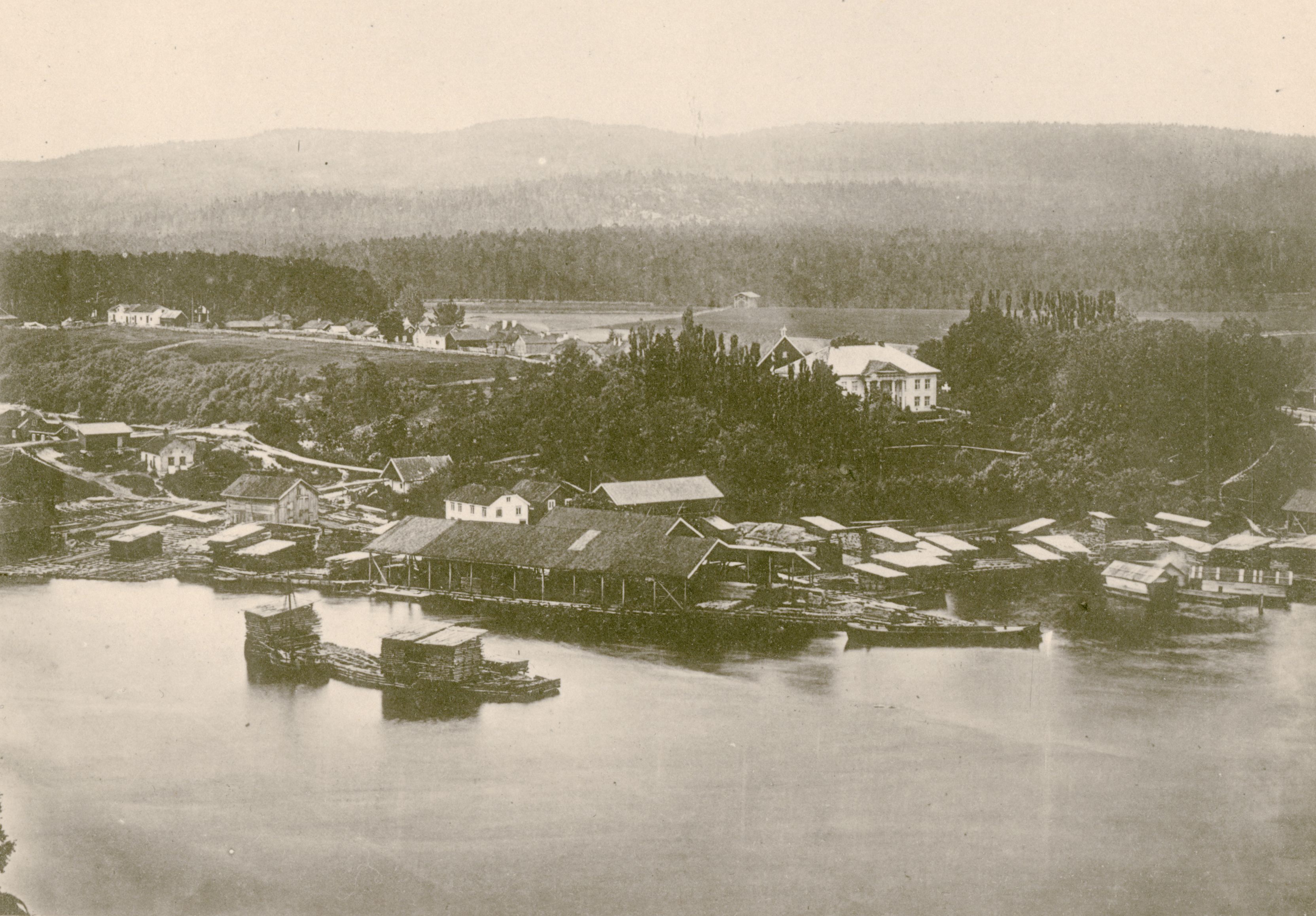 Skien i Skien, Telemark Serie av seks foto som danner panorama av Skien, innbundet med tittelen «Erindring fra Gamle Skien»". De andre numrene er T161_01_0488, T161_01_0490, T161_01_0491, T161_01_0492 og T161_01_0493.